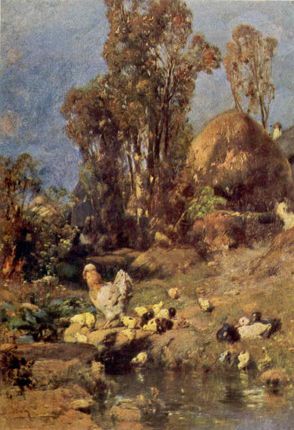 Patak partján. Mészöly Géza festménye (1877)